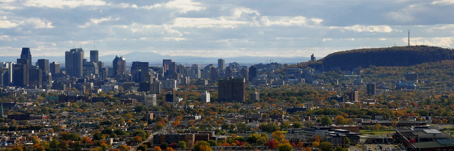 Vue de Montréal depuis la tour du Stade Olympique